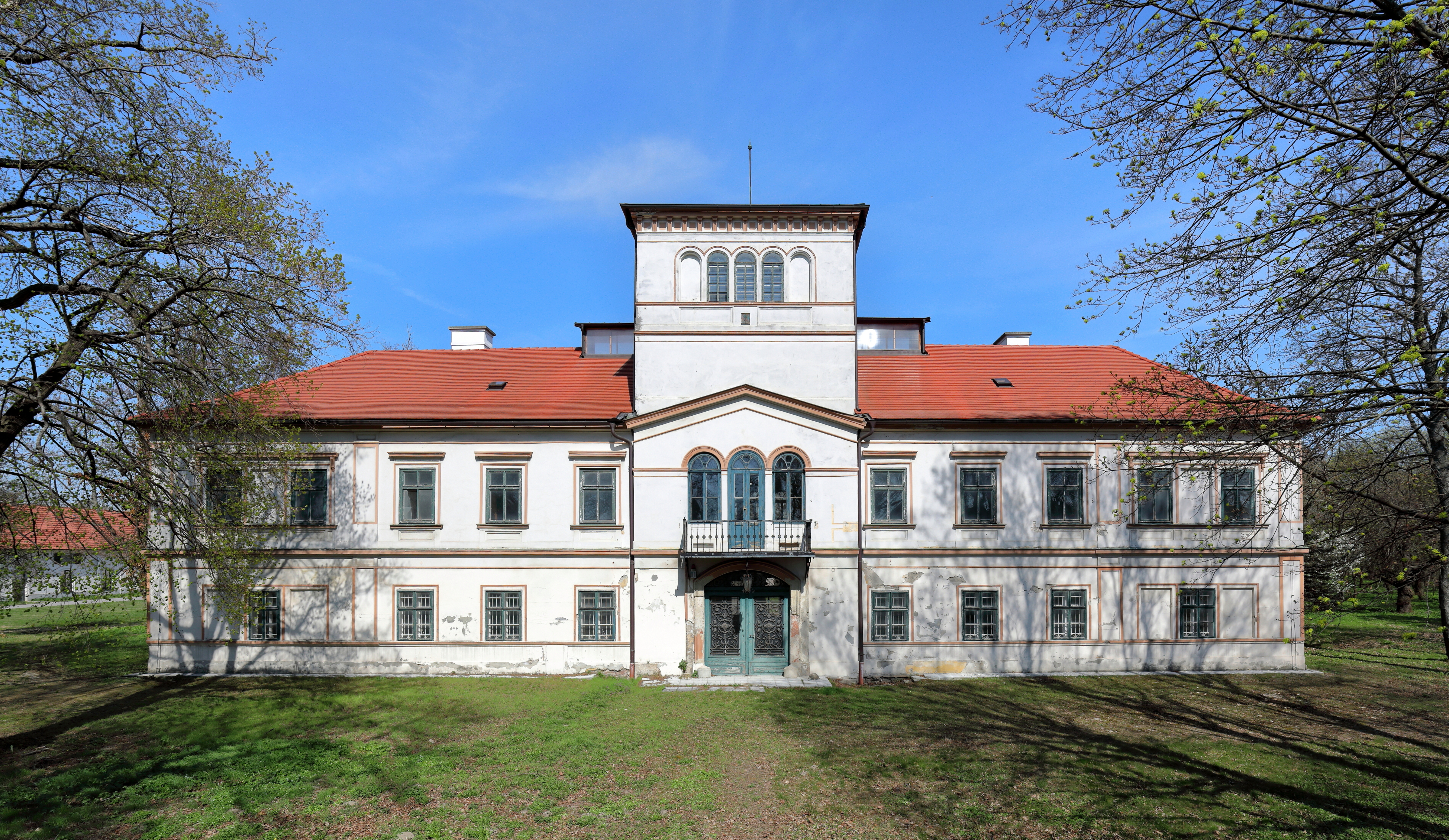 Südwestansicht des Schlosses Süßenbrunn im 22. Wiener Bezirk Donaustadt.Der Vorgängerbau war ein Feste, die um Zuge der Türkenkriege (1529) zerstört wurde. Im letzten Viertel des 16. Jahrhunderts wird der Ort von Urban Sueß (Siess) neu besiedelt und das Schloss errichtet. Das Hauptgebäude ist eine zweigeschossige U-förmige Anlage unter Walmdächern mit Turm und hinterem Ehrenhof. Mitte des 19. Jahrhunderts wurde die Hauptfassade im frühhistorischen Stil neu fassadiert.